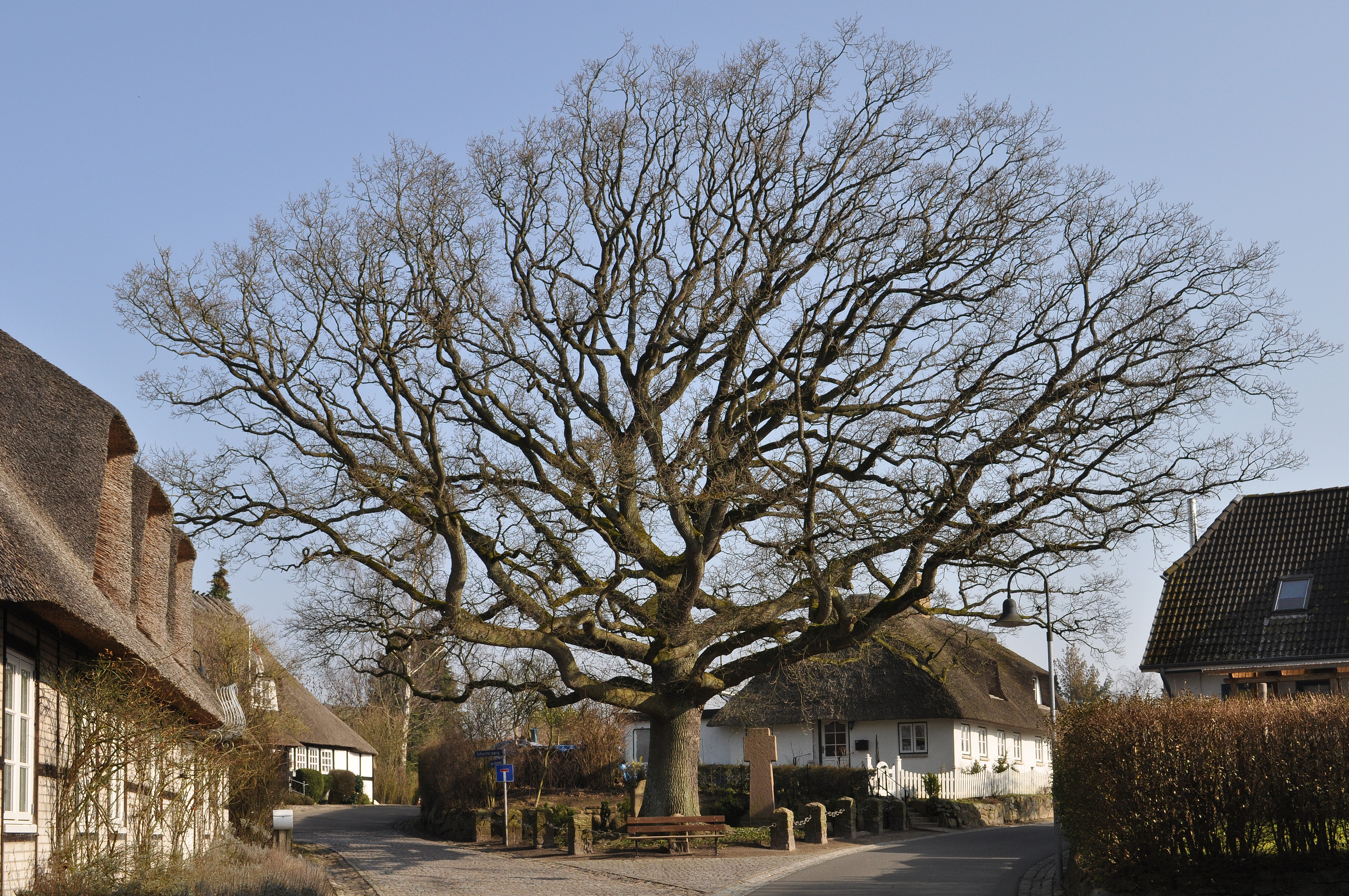 Blick von Südwesten auf Kriegerdenkmal in Brodersby (Schwansen)